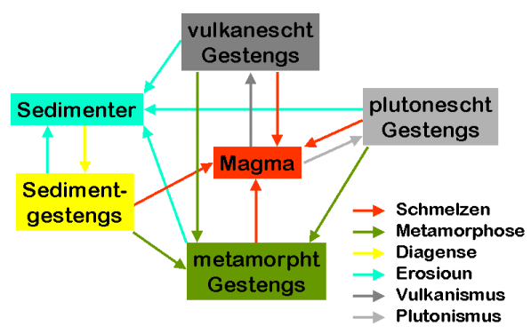 Zyklus vum Gestengs.